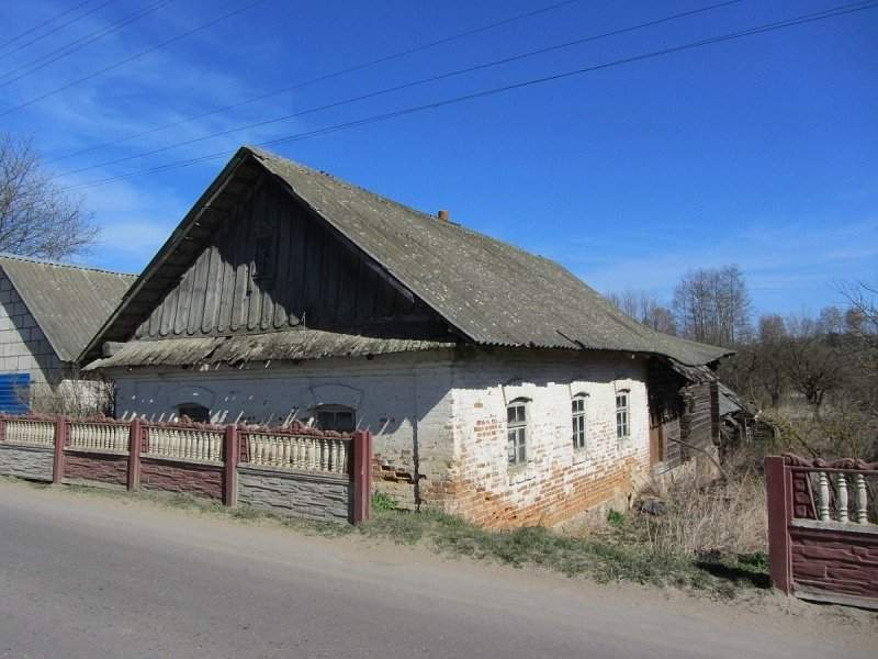 Турэц (Карэліцкі раён). Забудова